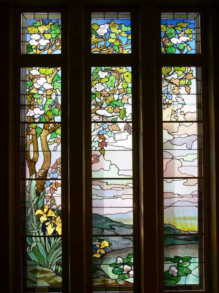 Vitrail de l'escalier de la mairie d'Euville par Jacques Grüber